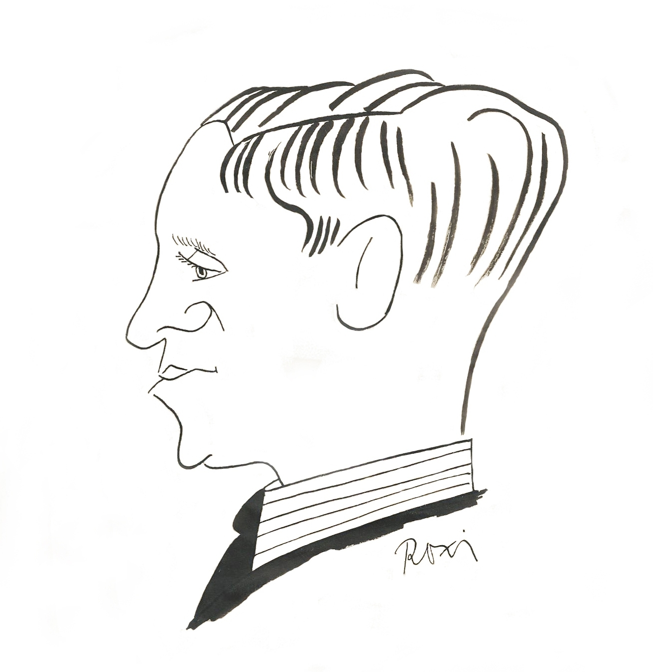 Ladanyi_Laszlo_car